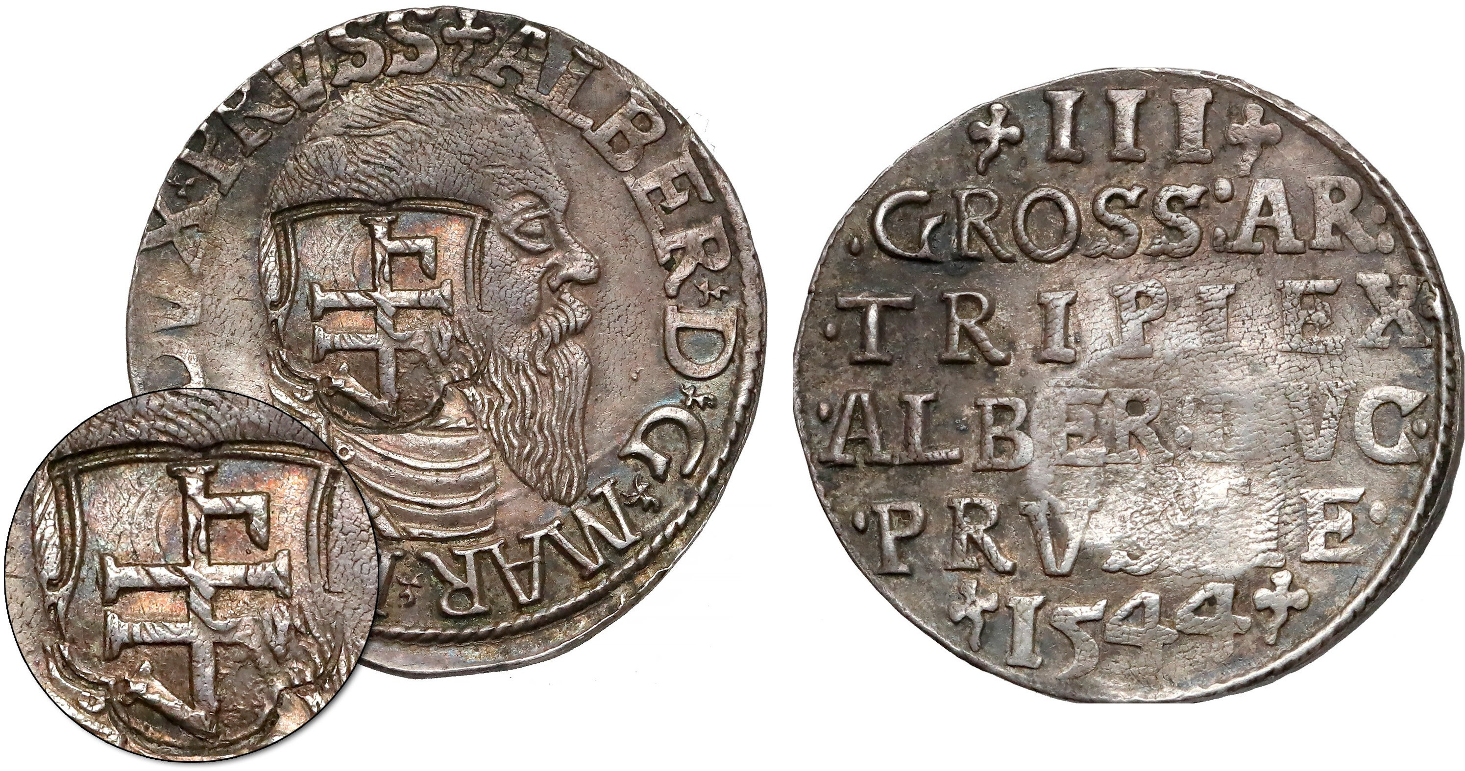 Oblezenie gdanska 1577 kontrmarka na trojaku pruskim